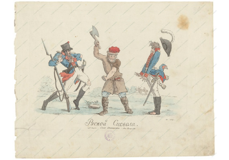 Рускі Сцэвола